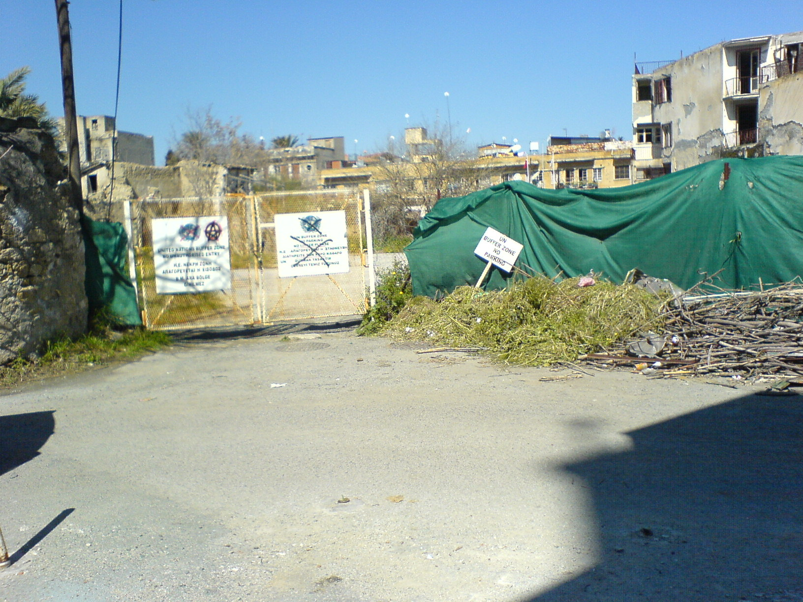 UN buffer zone in Nicosia, Cyprus